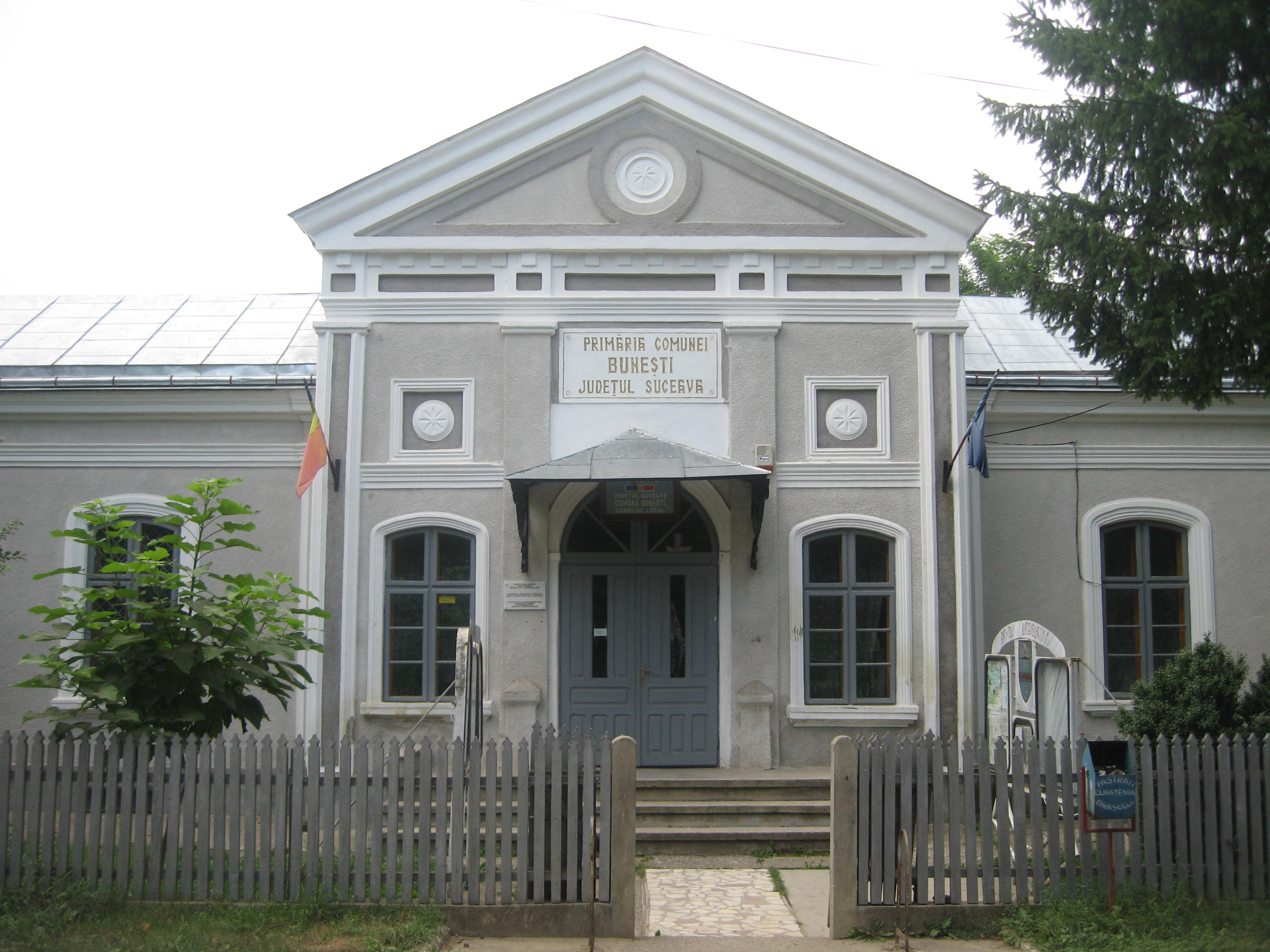 Pichetul de grăniceri din Bunești, Suceava County, Romania